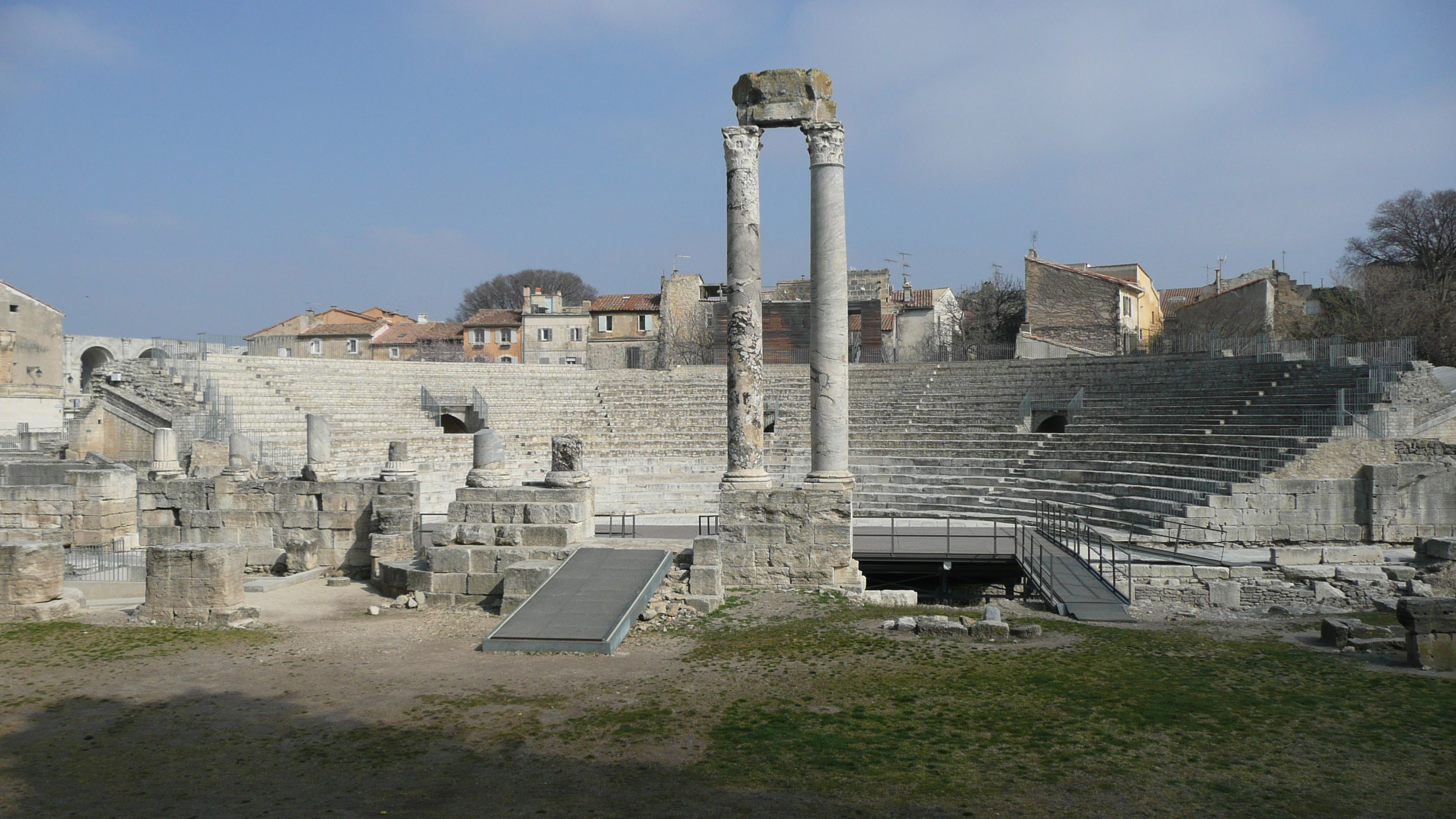 Vu depuis la rue du Cloître, donc à l'arrière de la scène